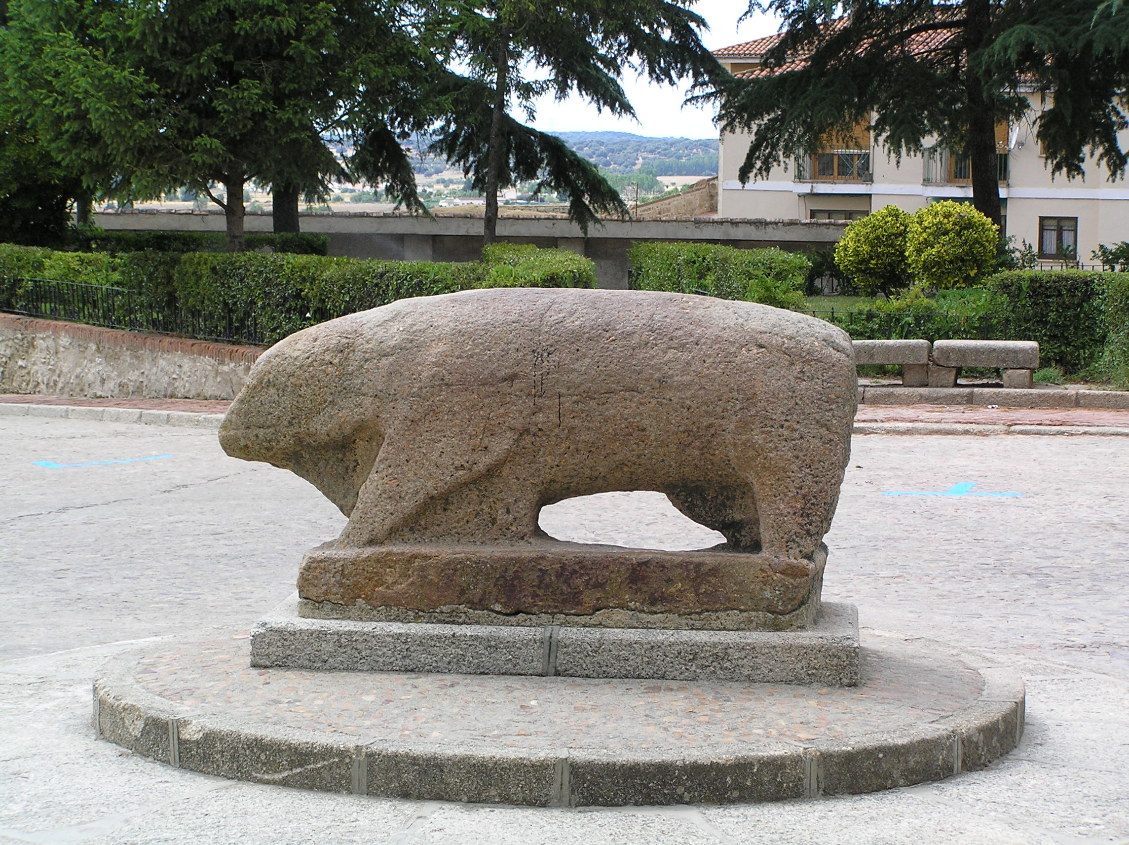 Berraco de granito, de posible origen vetón (Plaza del Castillo, Ciudad Rodrigo). Ciudad Rodrigo (provincia de Salamanca, España)